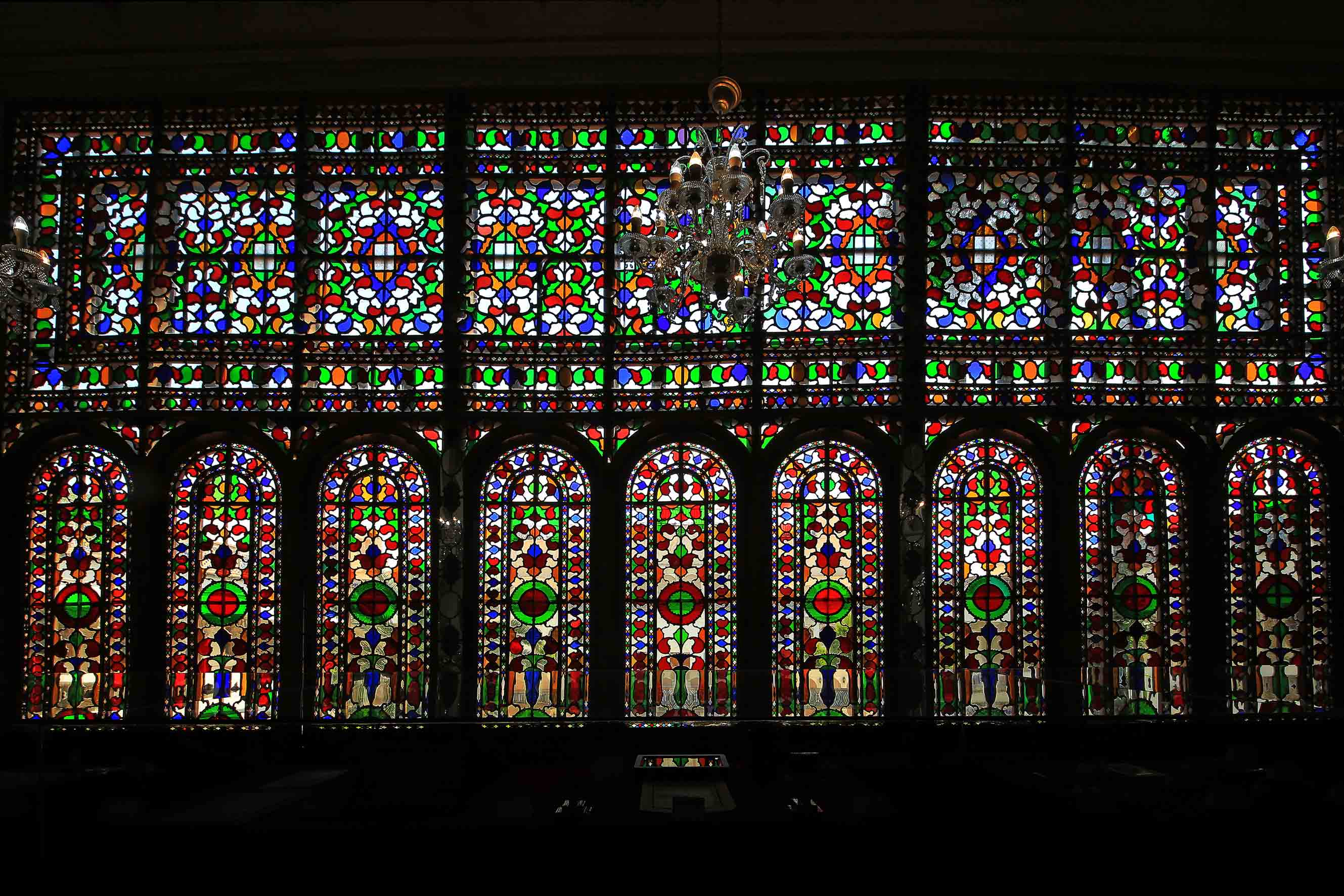 بزرگ ترین ارسی ایران